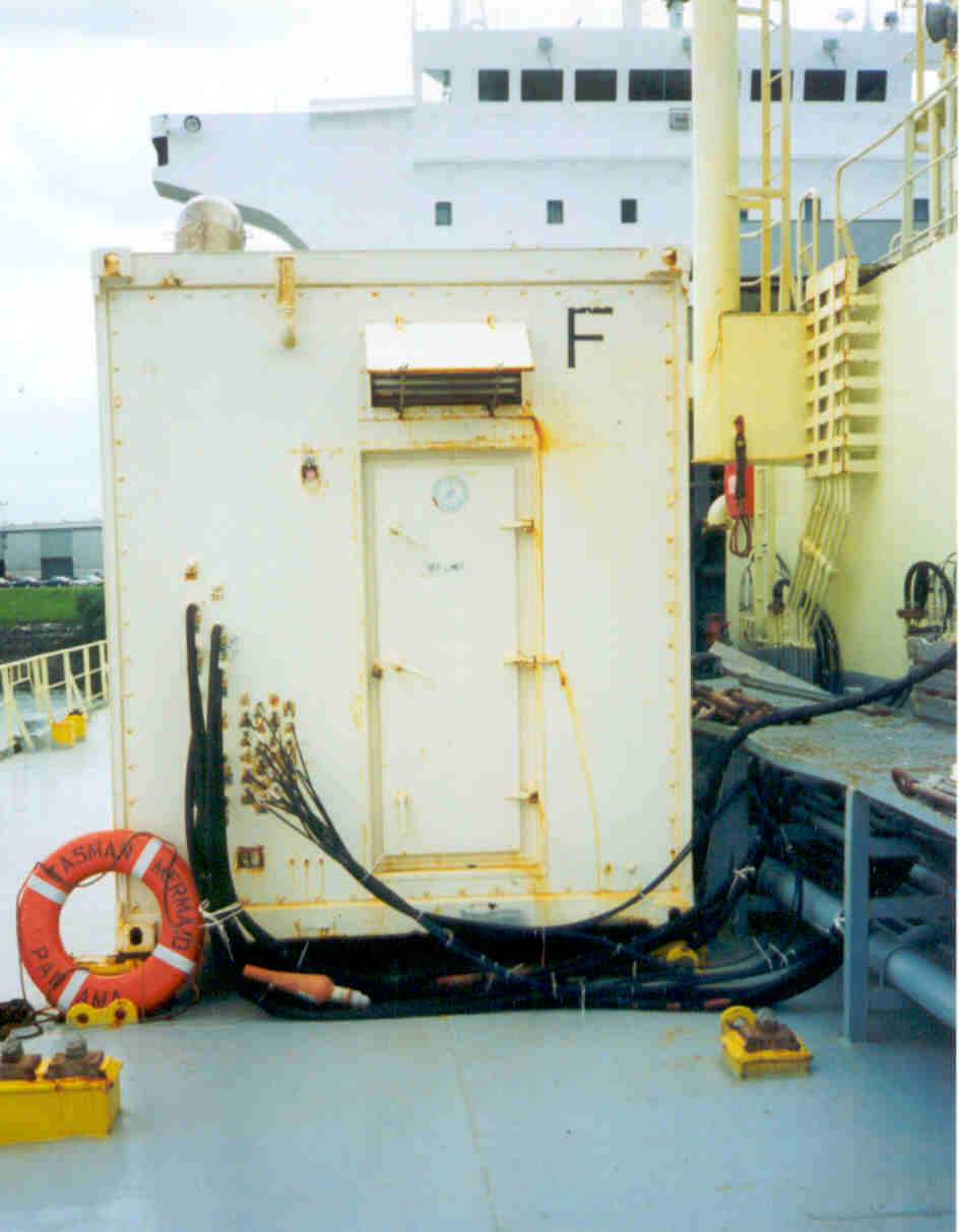 Container zur Stickstofferzeugung für den CA-Betrieb Kühlschiffes TASMAN MERMAID IMO Number: 9045950 MMSI Number: 636091099 Callsign: A8JI6 Length: 142 m Beam: 23 m